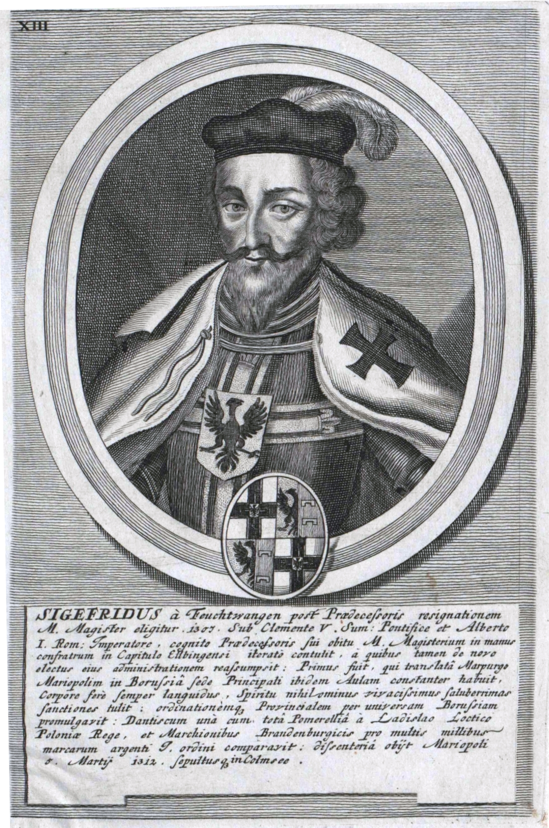 Siegfried von Feuchtwangen († 1311)